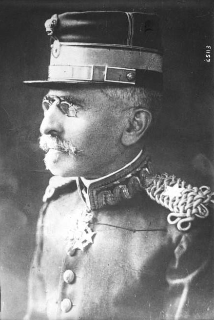 Photo de Panagiotis Danglis, publié dans Le Miroir le 13 octobre 1918.